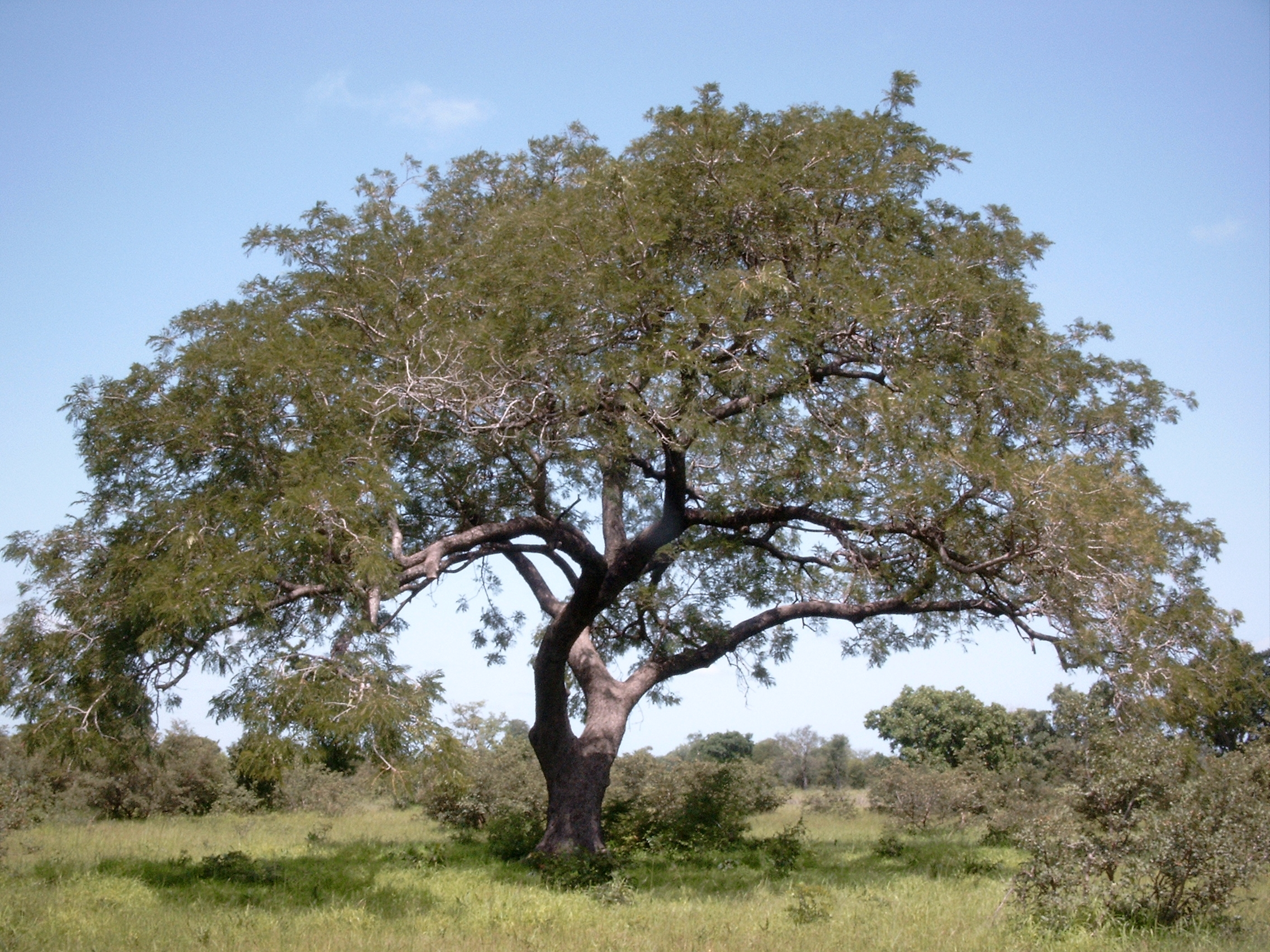 Néré (Parkia biglobosa) in einer sudanischen Savanne Burkina Fasos